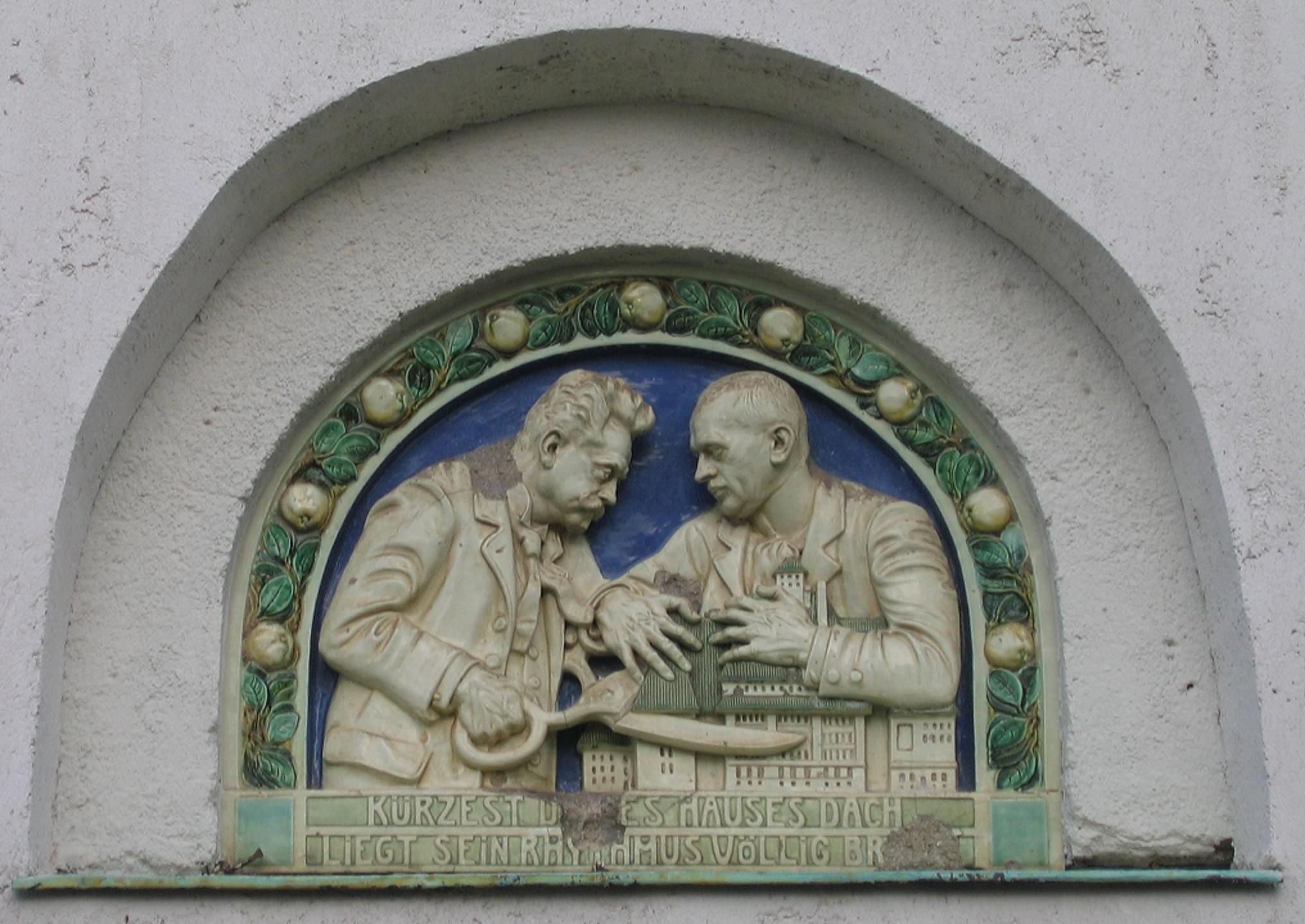 Relief am Südflügel des 1911 fertiggestellten Gebäudes des Gymnasiums Dresden-Cotta über den Streit zwischen dem Architekten Hans Erlwein (rechts) und dem Stadtrat Förster, ob das Dach hoch oder flach gebaut werden solle.Bildunterschrift: „Kürzest du des Hauses Dach, liegt sein Rhythmus völlig brach“.